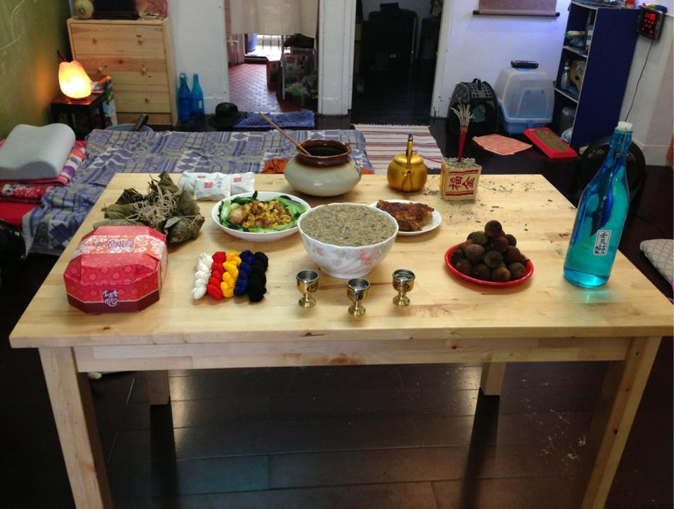 中文（香港）: 台灣端午祭品。